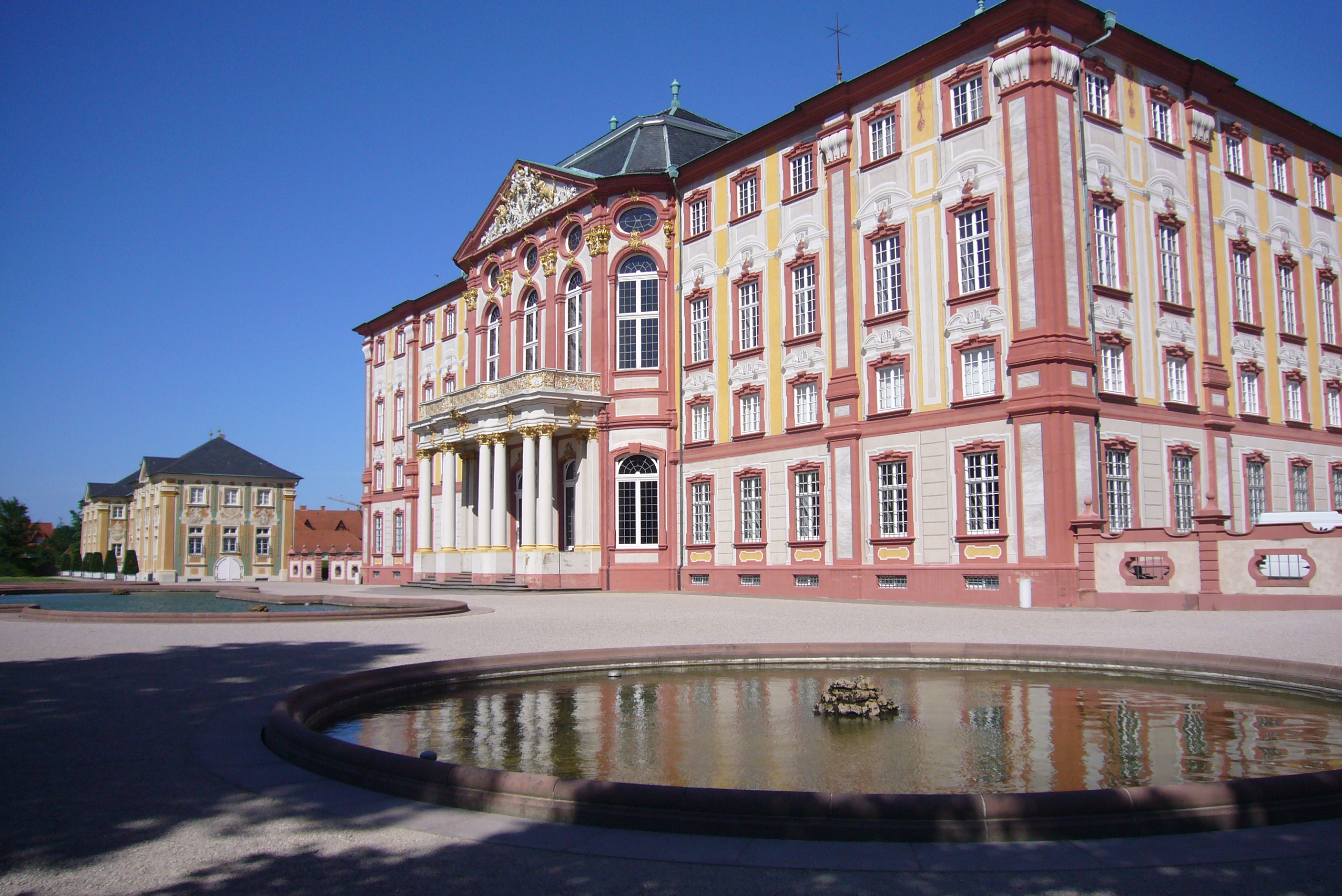 Bruchsaler Schloss.